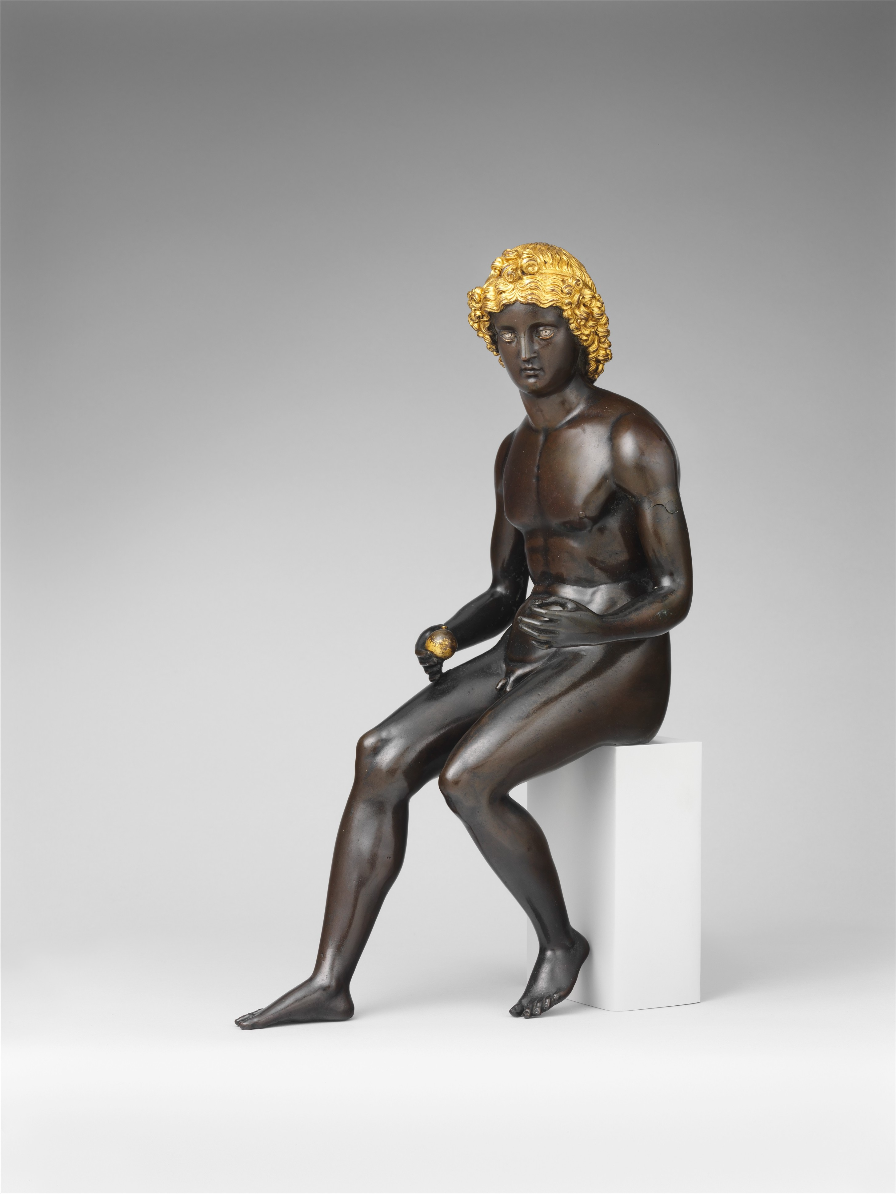 Italian, Mantua; Statuette; Sculpture-Bronze